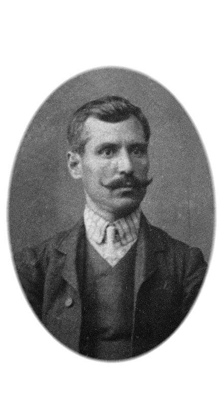 Йоанис Зянас, арумънин от село Ксироливадо, румънски учител във Воден.